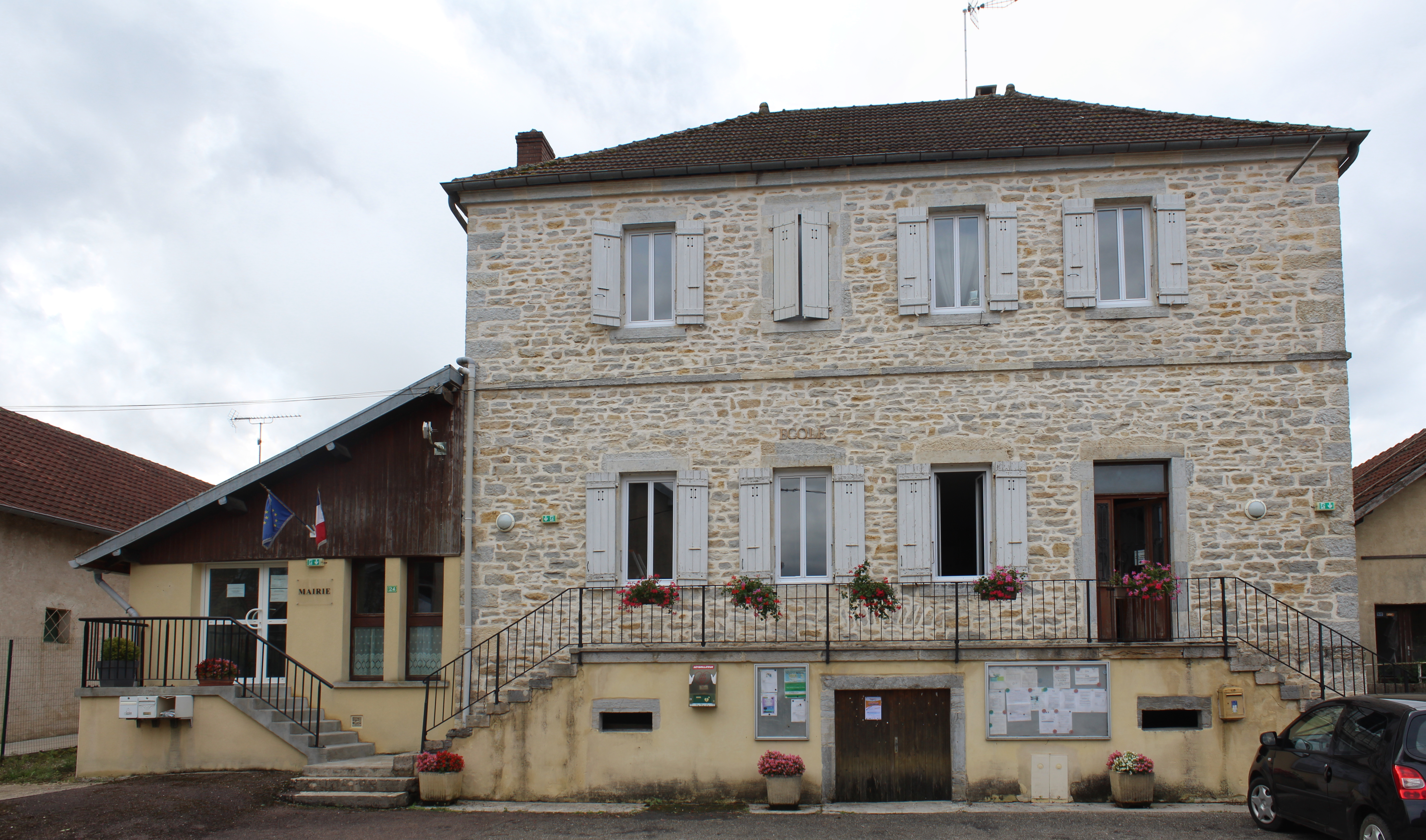 Mairie de Séligney.